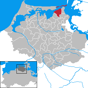 Groß Mohrdorf in Mecklenburg-Vorpommern - District Nordvorpommern